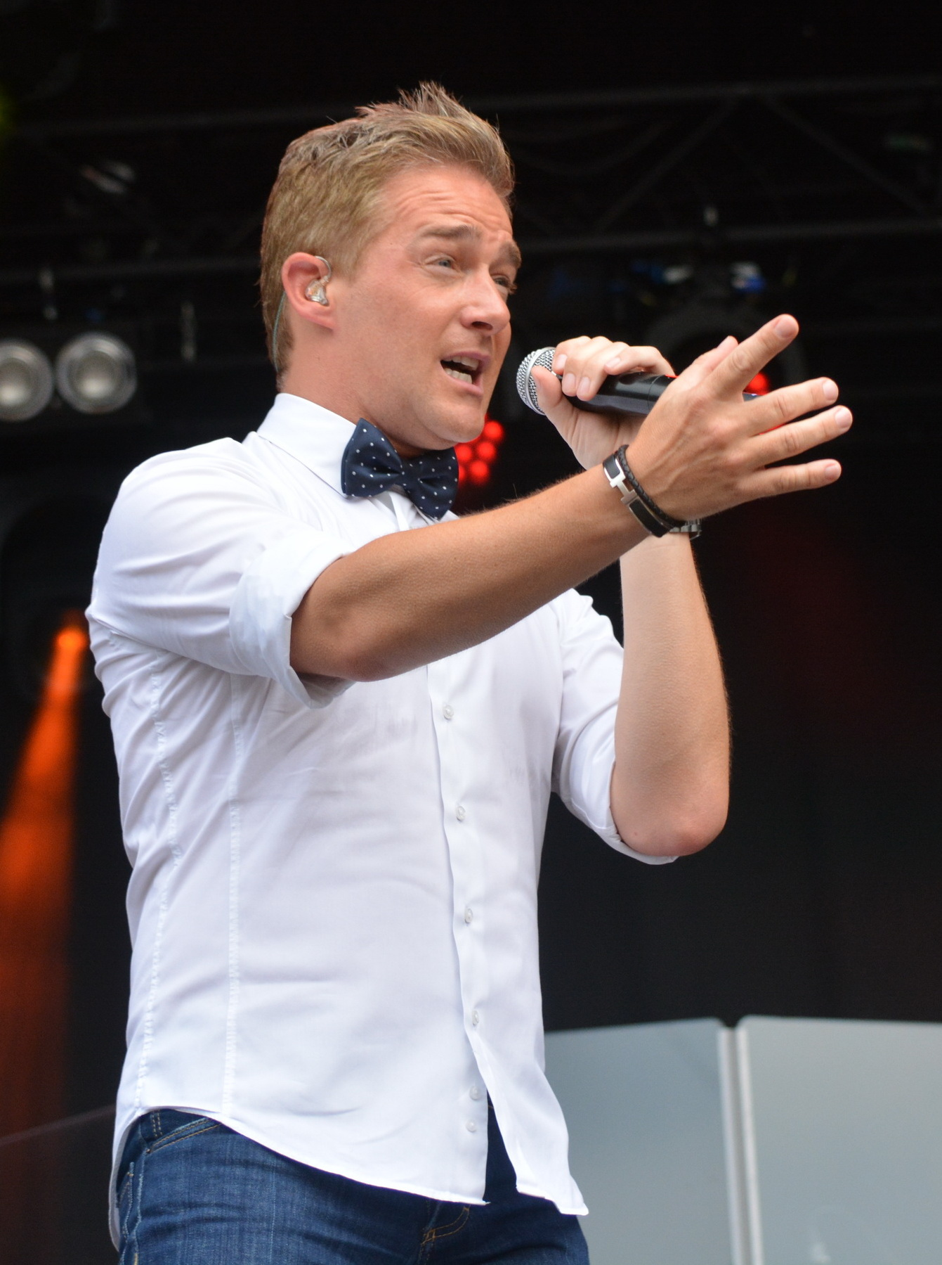 Christoff tijdens zijn optreden op Maanrock 2015 in Mechelen